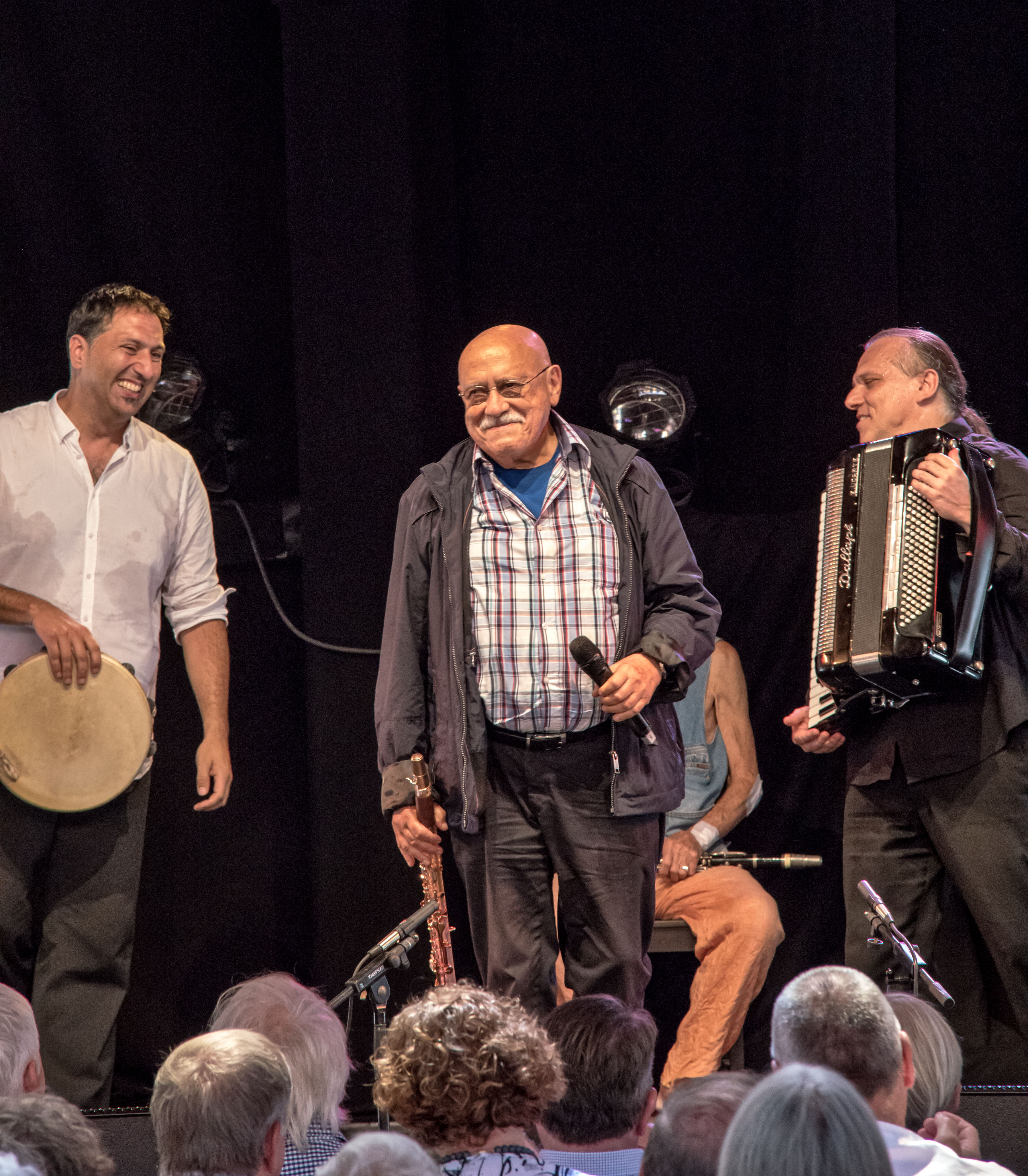 Bilder vom Zelt Musik Festival 2016 in Freiburg im Breisgau Klassik-Matinee „Von Bach bis Tango“ Enrique Ugarte (Akk), Raúl Alvarellos-Benari (Kl.), Gershwin Quartett (Streicher), Matthias Matzke (Akk.), Perry Robinson & Gerald Achee (Kl. & Perk.), Manuel Druminski (Vl.), Murat Cos˛kuns (Perk.)